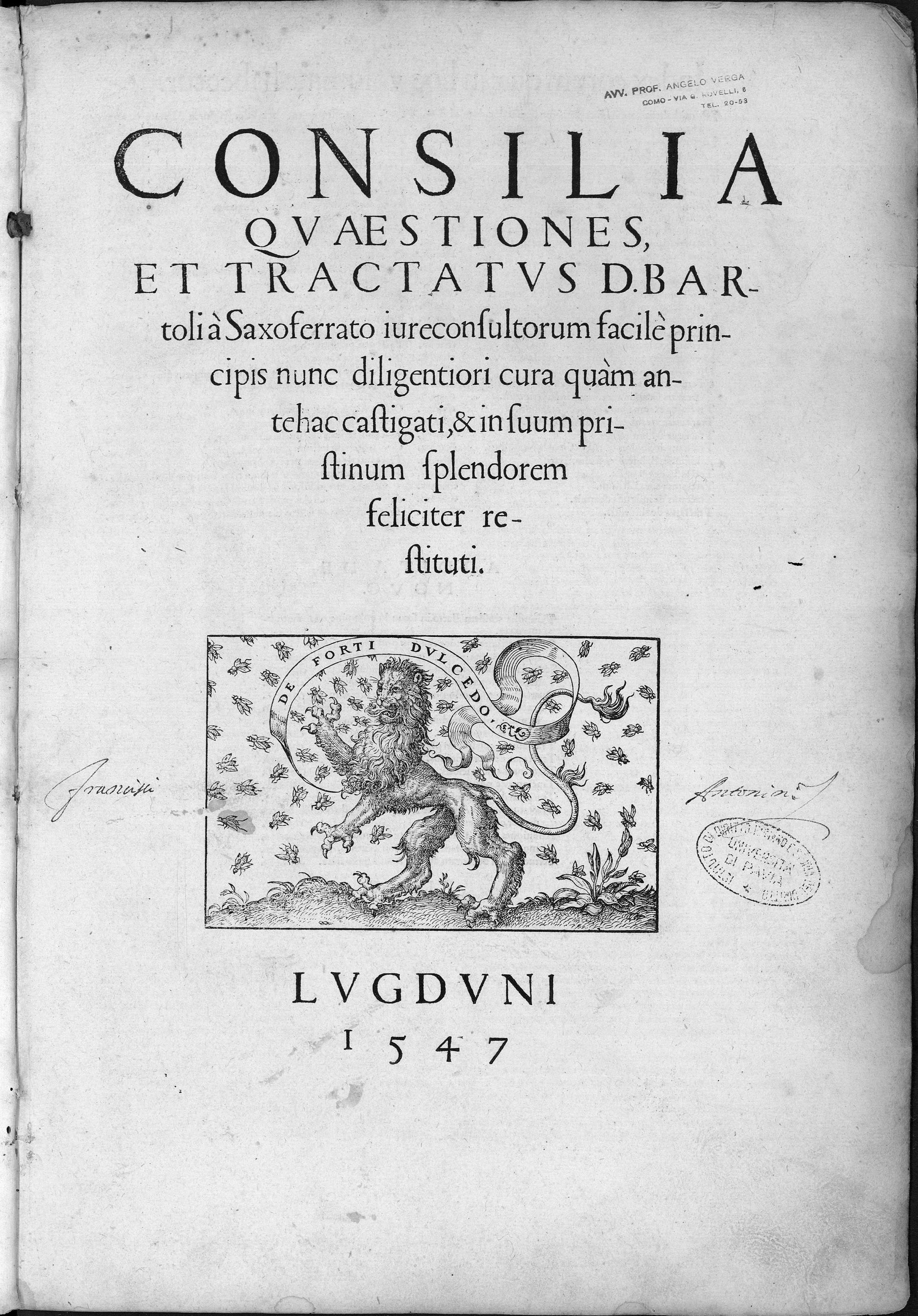 Frontespizio